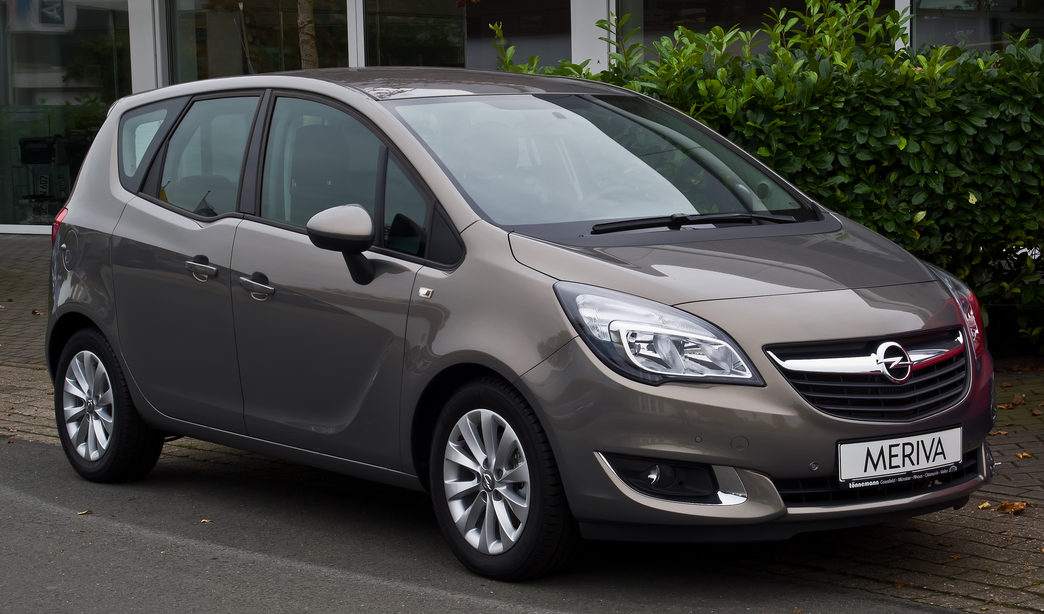 Opel Meriva 1.4 Style (B, Facelift)